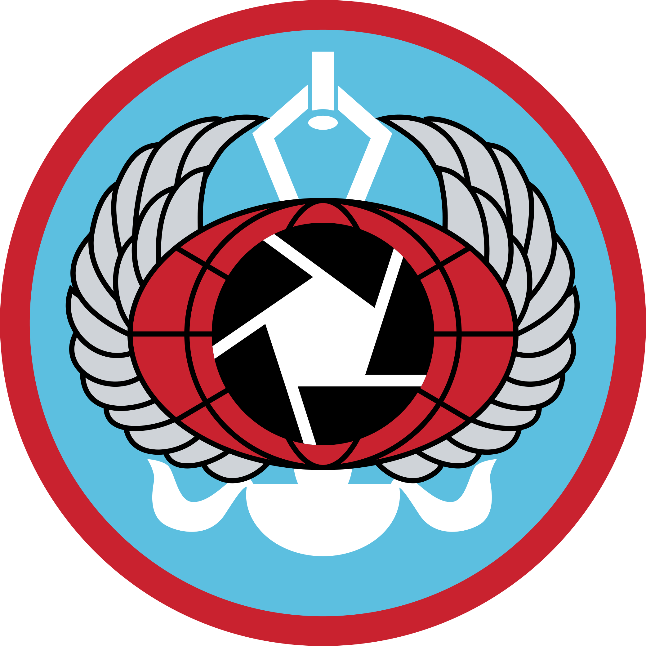 סמל יחידת שט"ל 121 - "יחידת שירות טכנולוגי למודיעין" של חיל האוויר הישראלי.